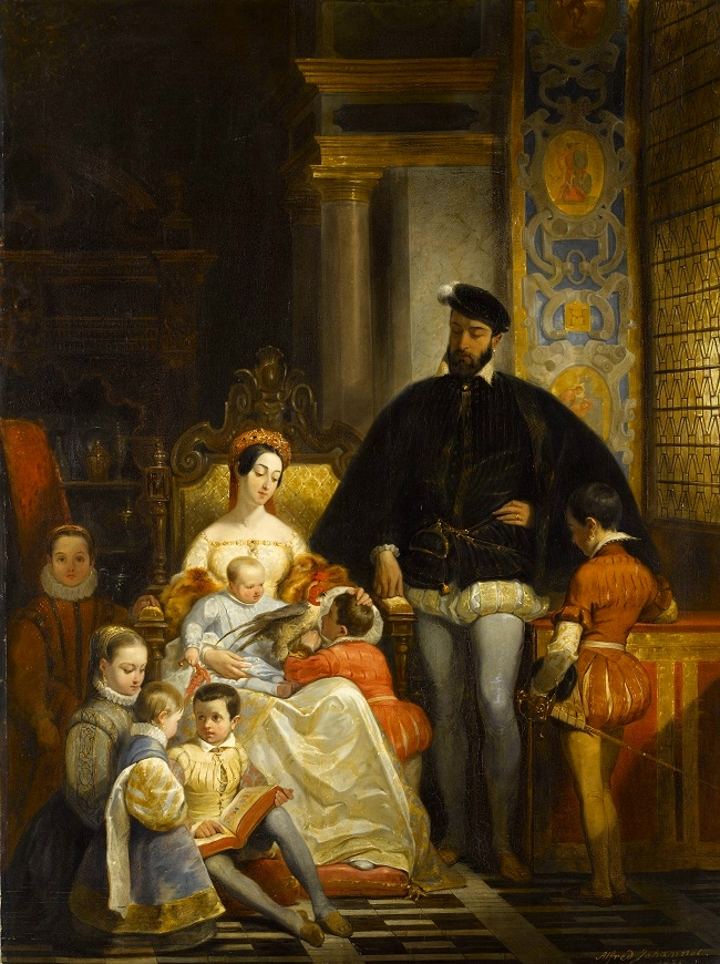 Henri II, Catherine de Médicis et leurs enfants, huile sur toile d'Alfred Johannot, 1,75 x 1,34 m. vers 1830. Musée du Louvre. Inv : 5451.